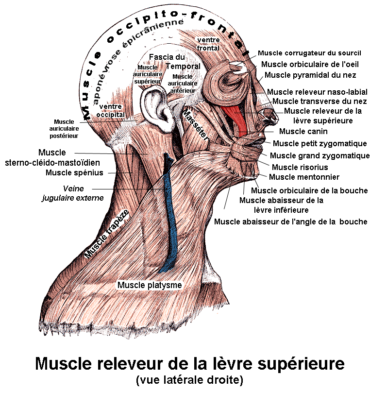 muscle releveur de la lèvre supérieure. Anatomie humaine